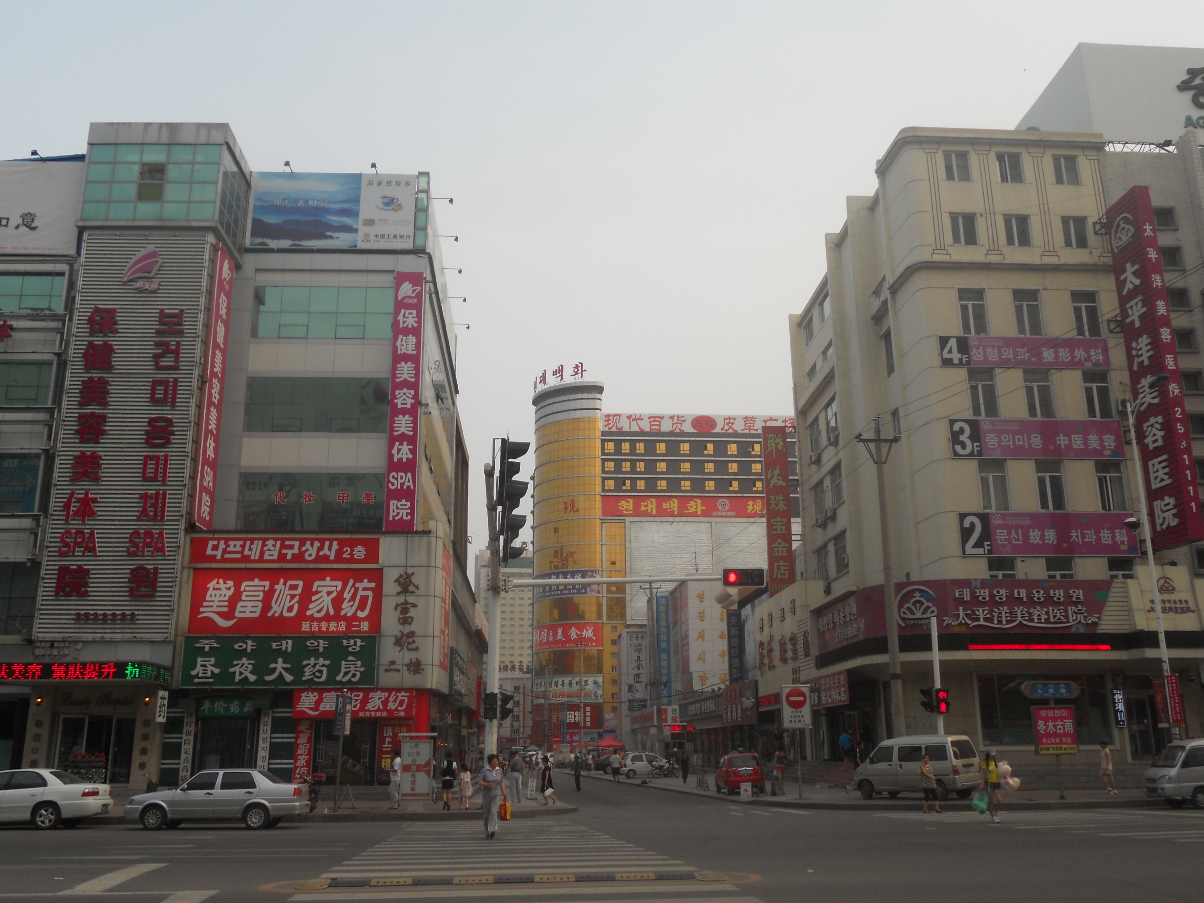 Yanji